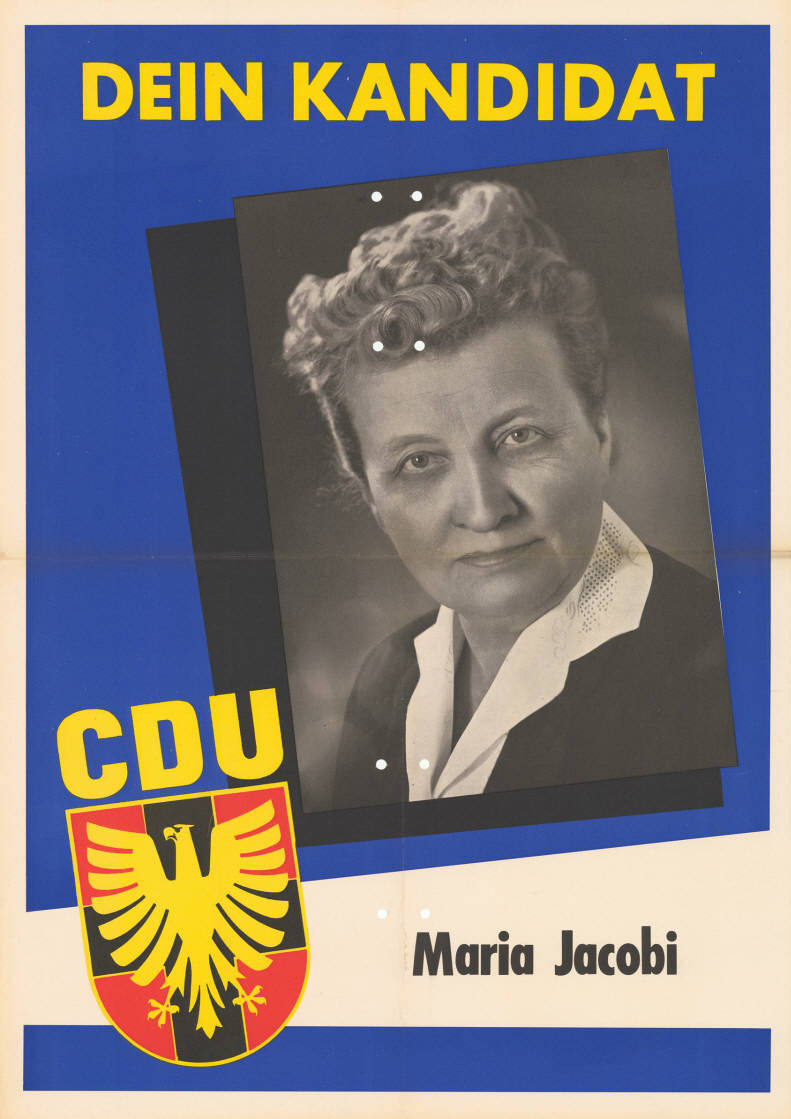 Dein Kandidat CDU Maria JacobiAbbildung:Porträtfoto - CDU-LogoPlakatart:Kandidaten-/Personenplakat mit PorträtObjekt-Signatur:10-009 : 375Bestand:Landtagswahlplakate Nordrhein-Westfalen (10-009)GliederungBestand10-18:Landtagswahlplakate Nordrhein-Westfalen (10-009) » Landtagswahl am 6.7.1958 » CDU » mit Porträt-FotoLizenz:KAS/ACDP 10-009 : 375 CC-BY-SA 3.0 DE